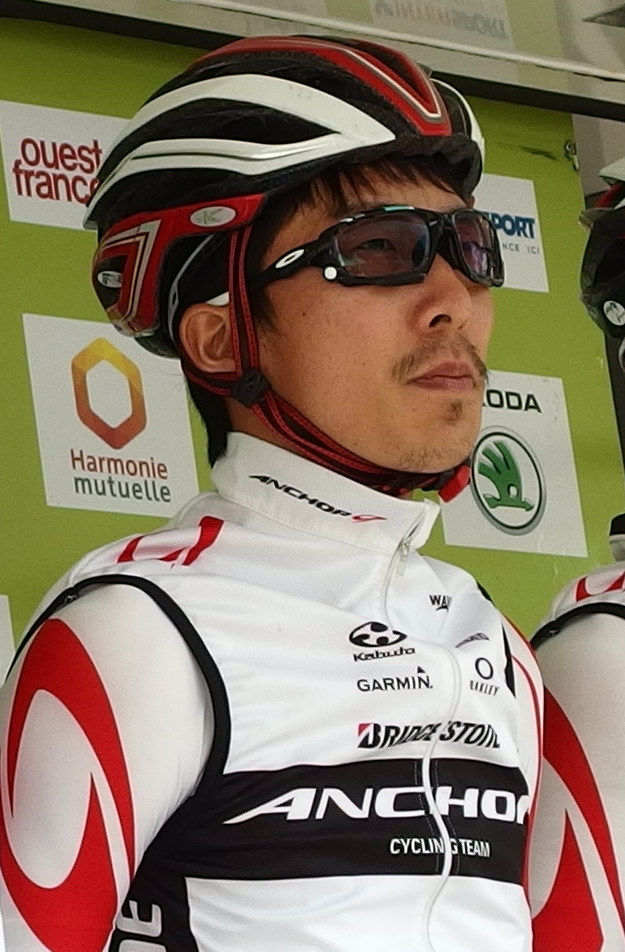 Tour de Bretagne 2015 - Présentation des équipes au départ de la troisième étape à Baud - Équipe Bridgestone Anchor Depicted person: Ryota Nishizono